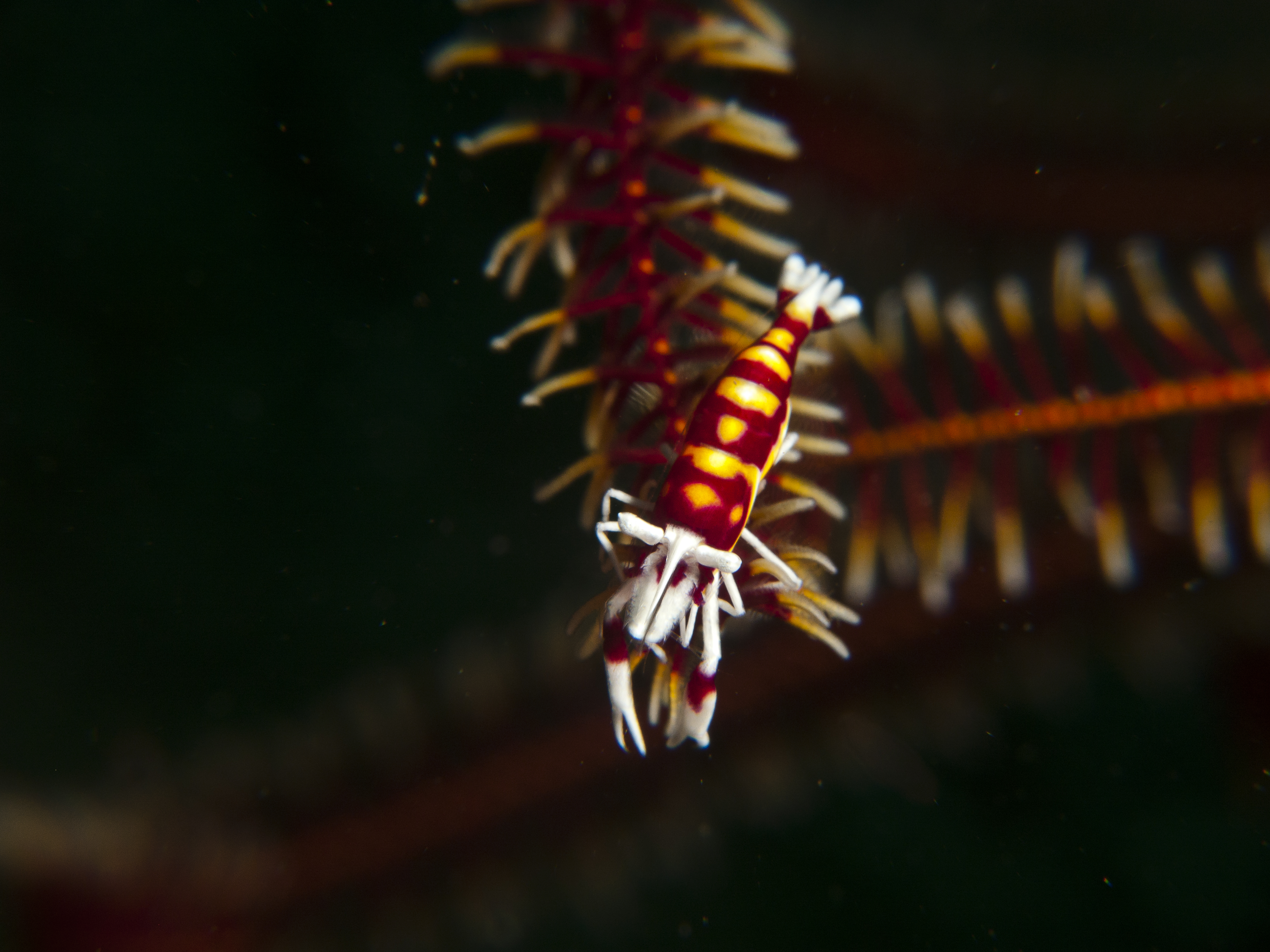 Crevette symbiotique (Laomenes cornutus, anciennement Periclimenes cornutus) sur une comatule.